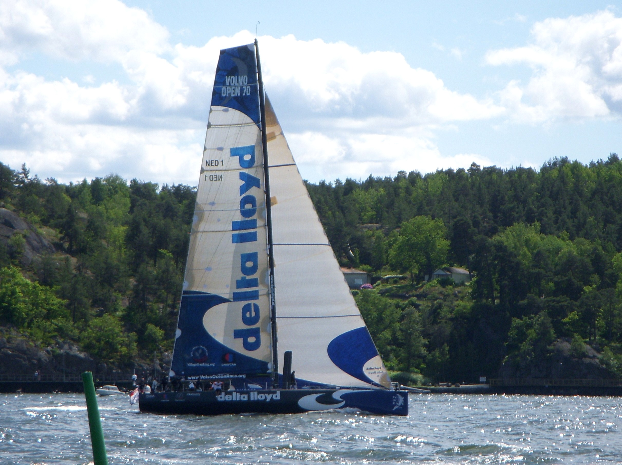 Volvo Ocean Race 2008/2009, Stopover Stockholm, DELTA LLOYD (NED 1)